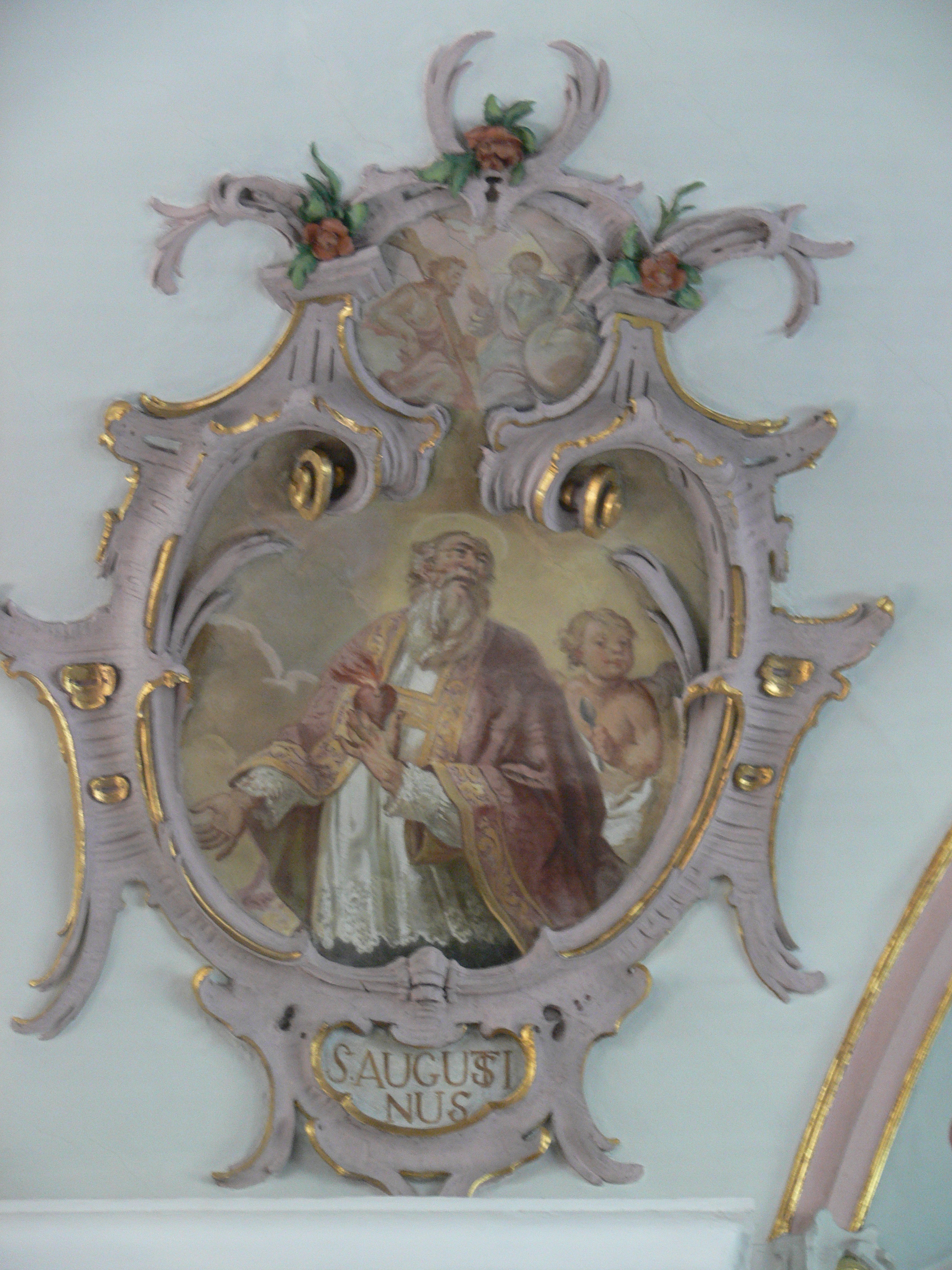 Pfarrkirche St. Pankratius, Wiggensbach Franz Joseph Hermann: Kirchenvater Augustinus von Hippo